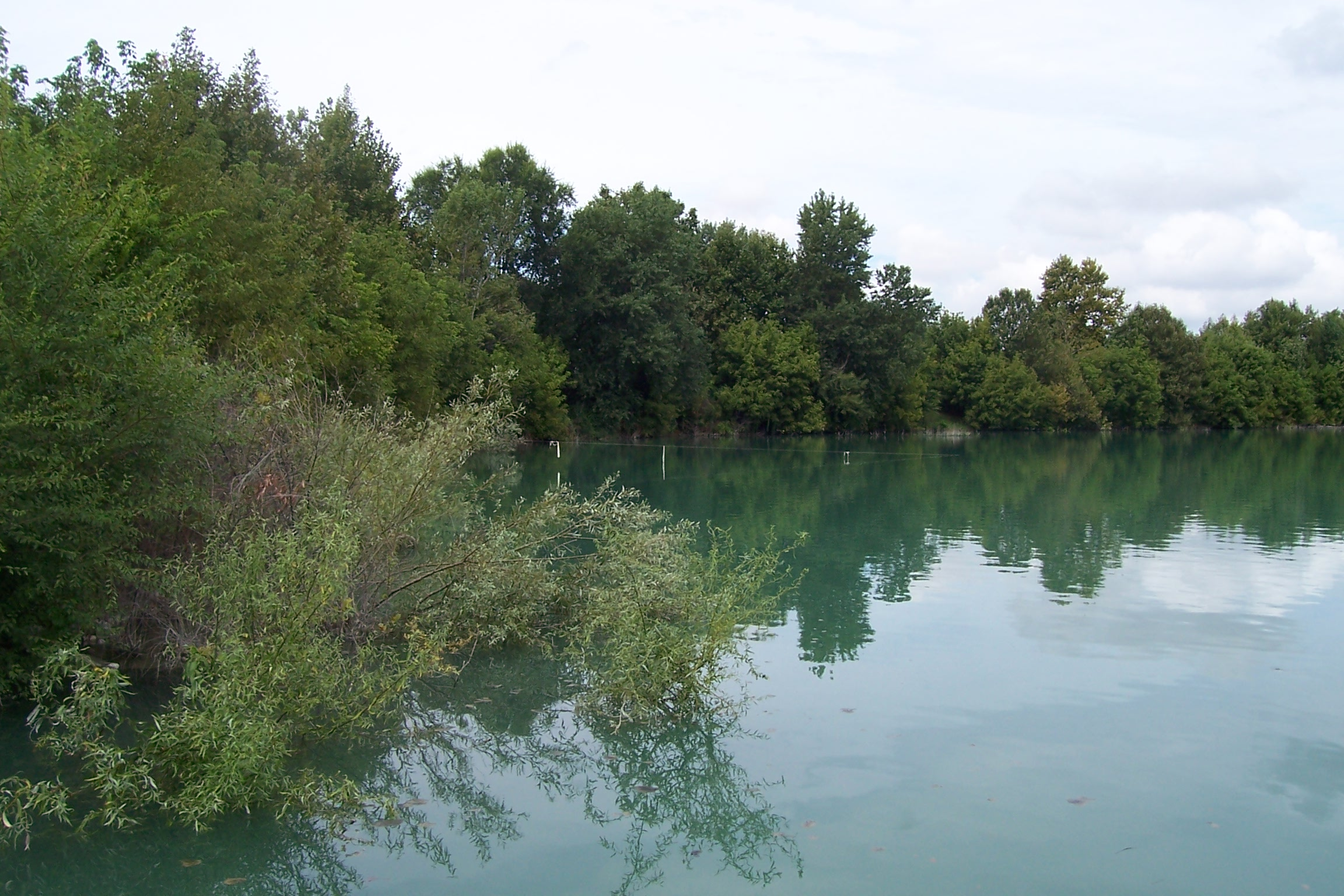 Milano, boschi all'Idroscalo